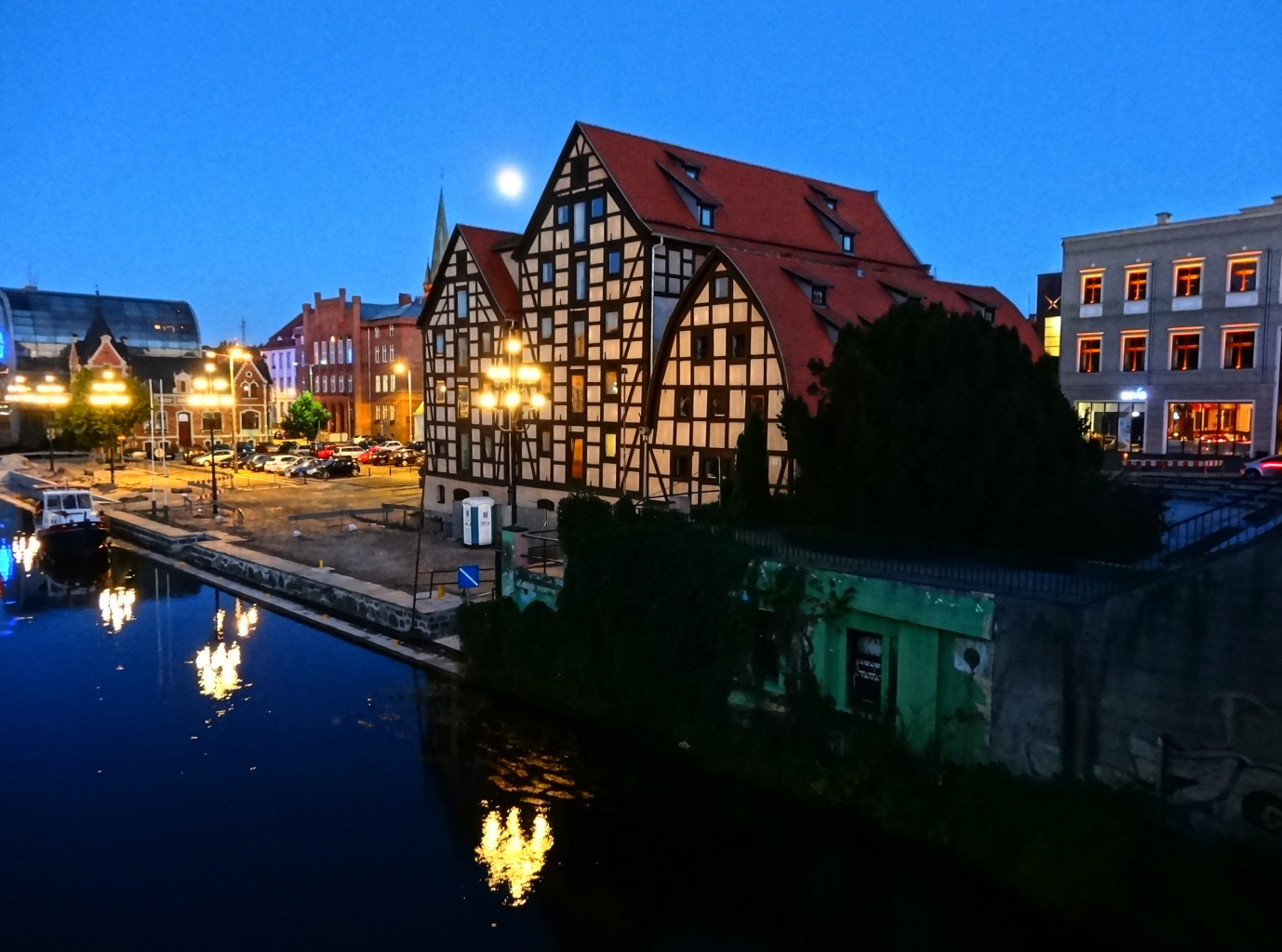 Spichrze nad Brdą w Bydgoszczy, zbud. w latach 1793-1800, od 1964 r. w gestii Muzeum Okręgowego